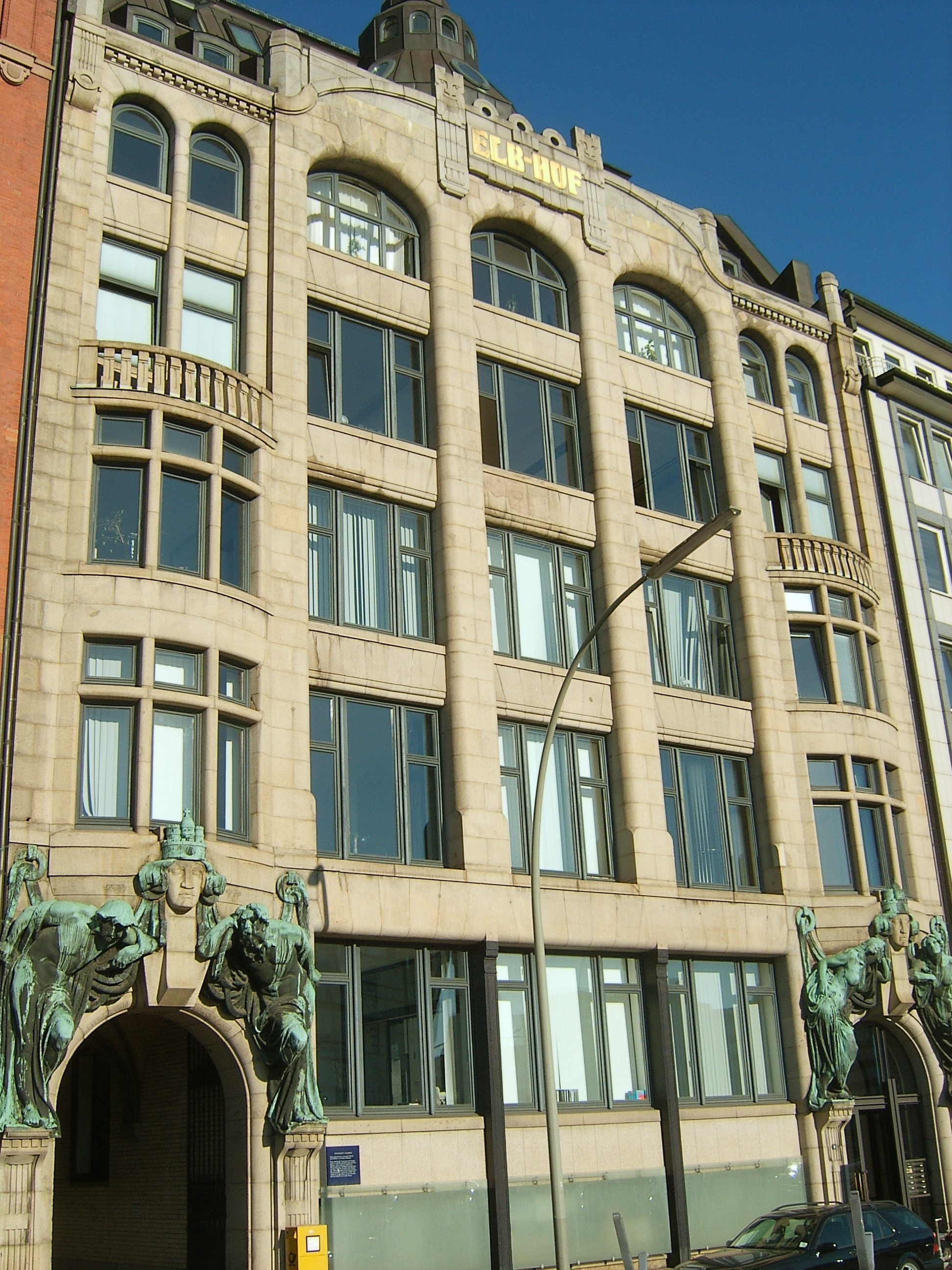 Hamburg, Neustadt, Elbhof This is a photograph of an architectural monument.